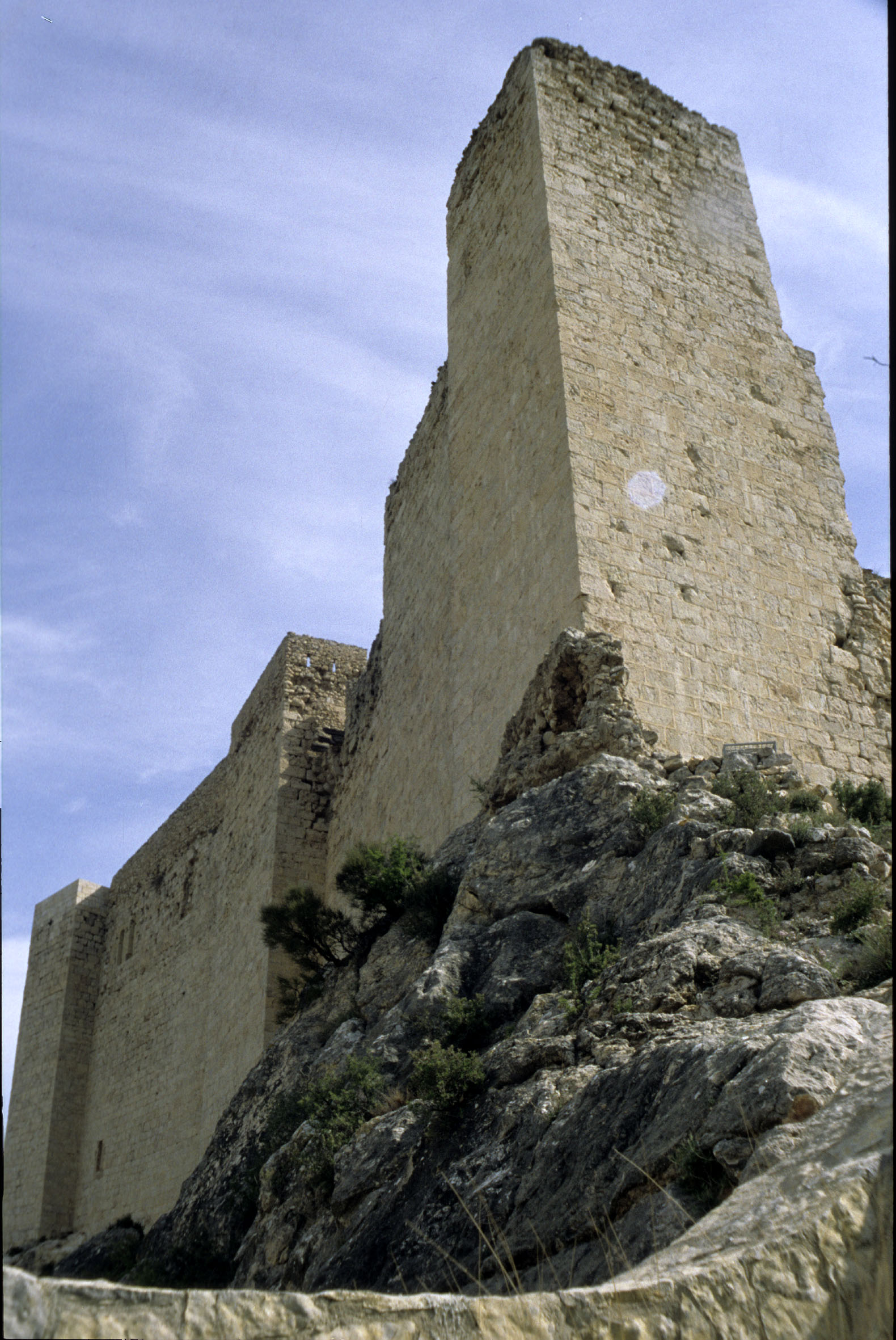 El castell de Miravet (Ribera d'Ebre), seu de la comanda del mateix nom. Vista exterior des de ponent (Fot. J. Fuguet)